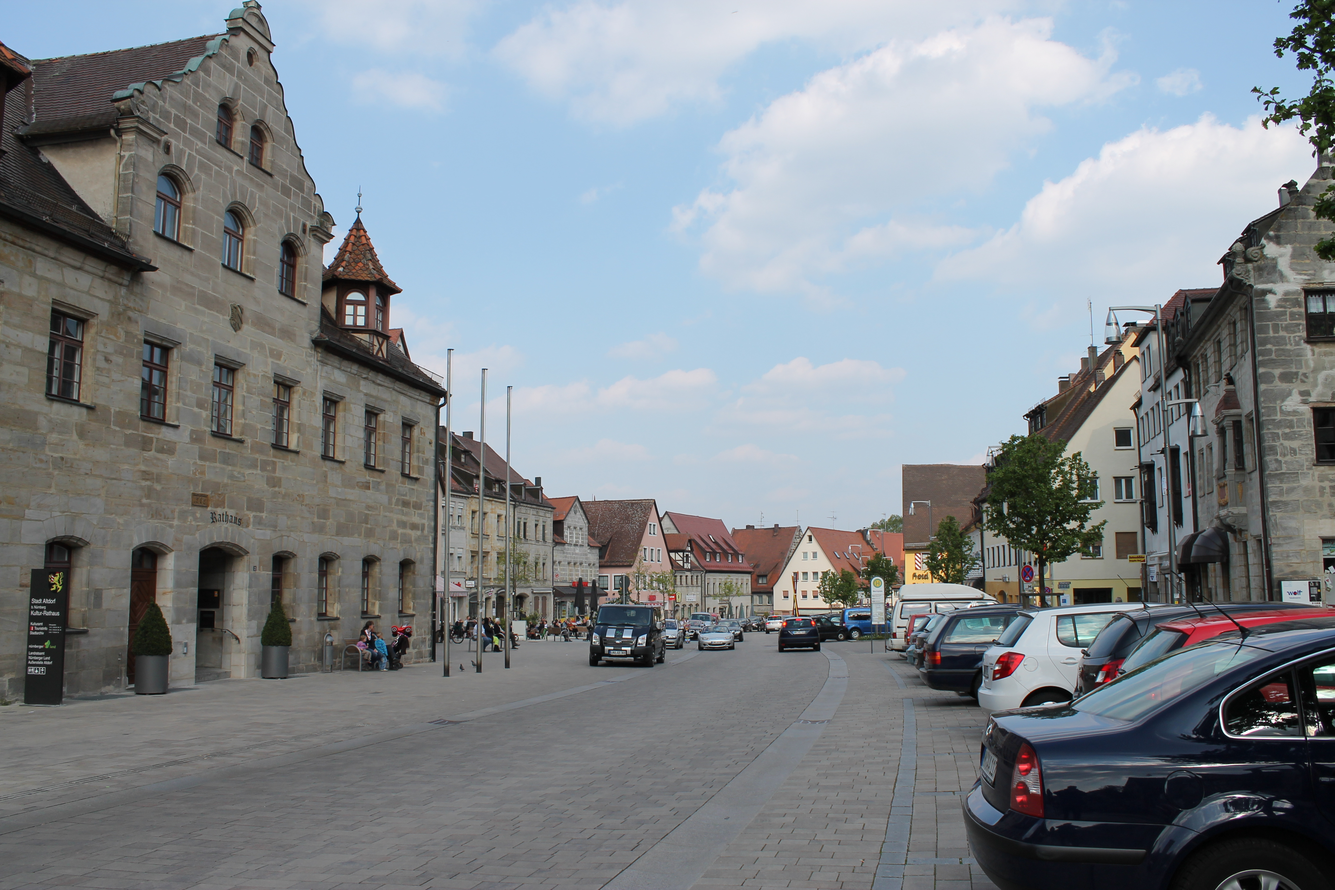 Cultural heritage monuments in Altdorf bei Nürnberg